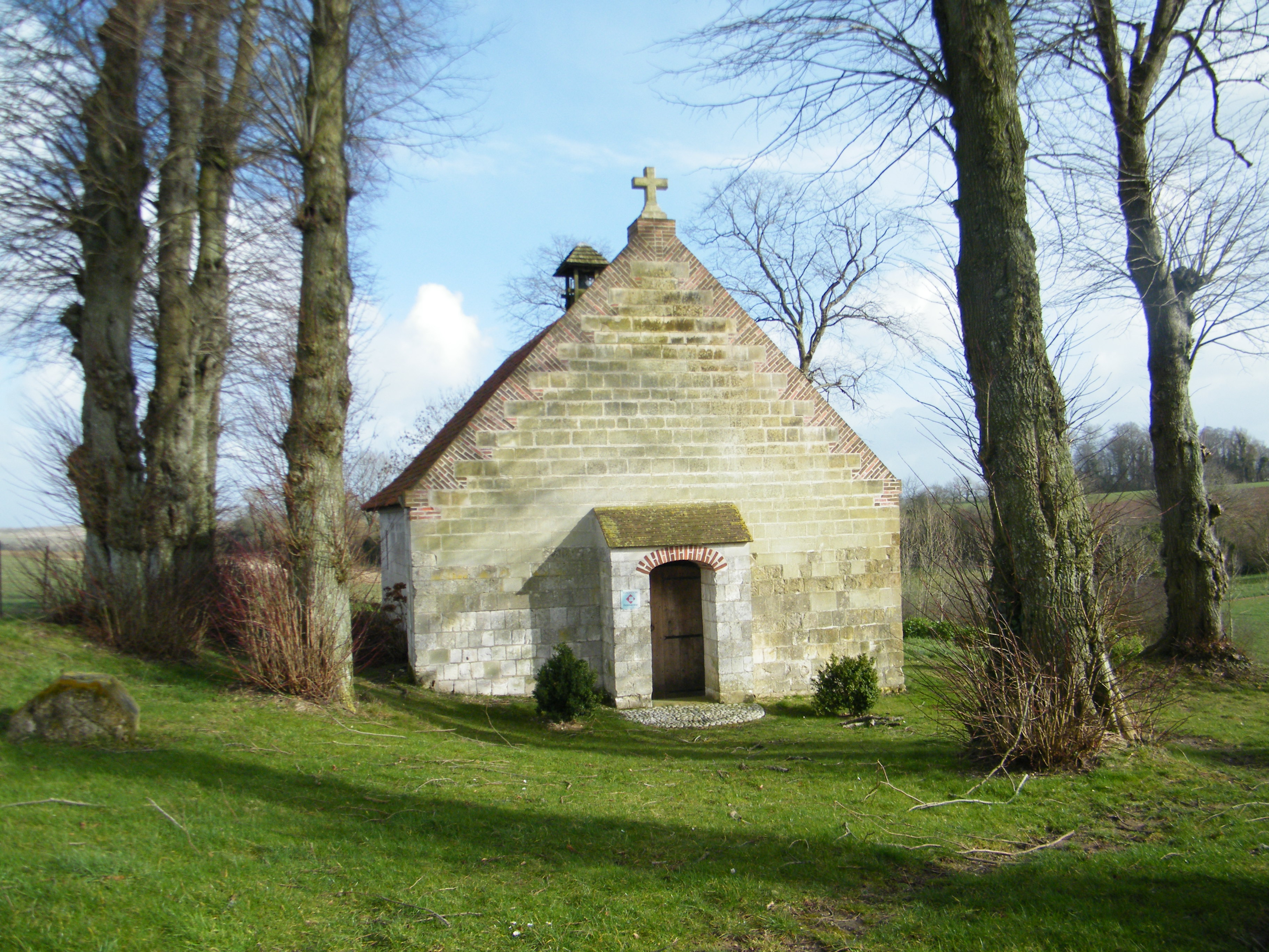 La chapelle d'Hémimont.